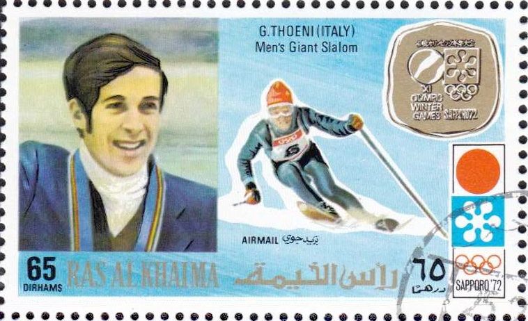 Gustav Thöni